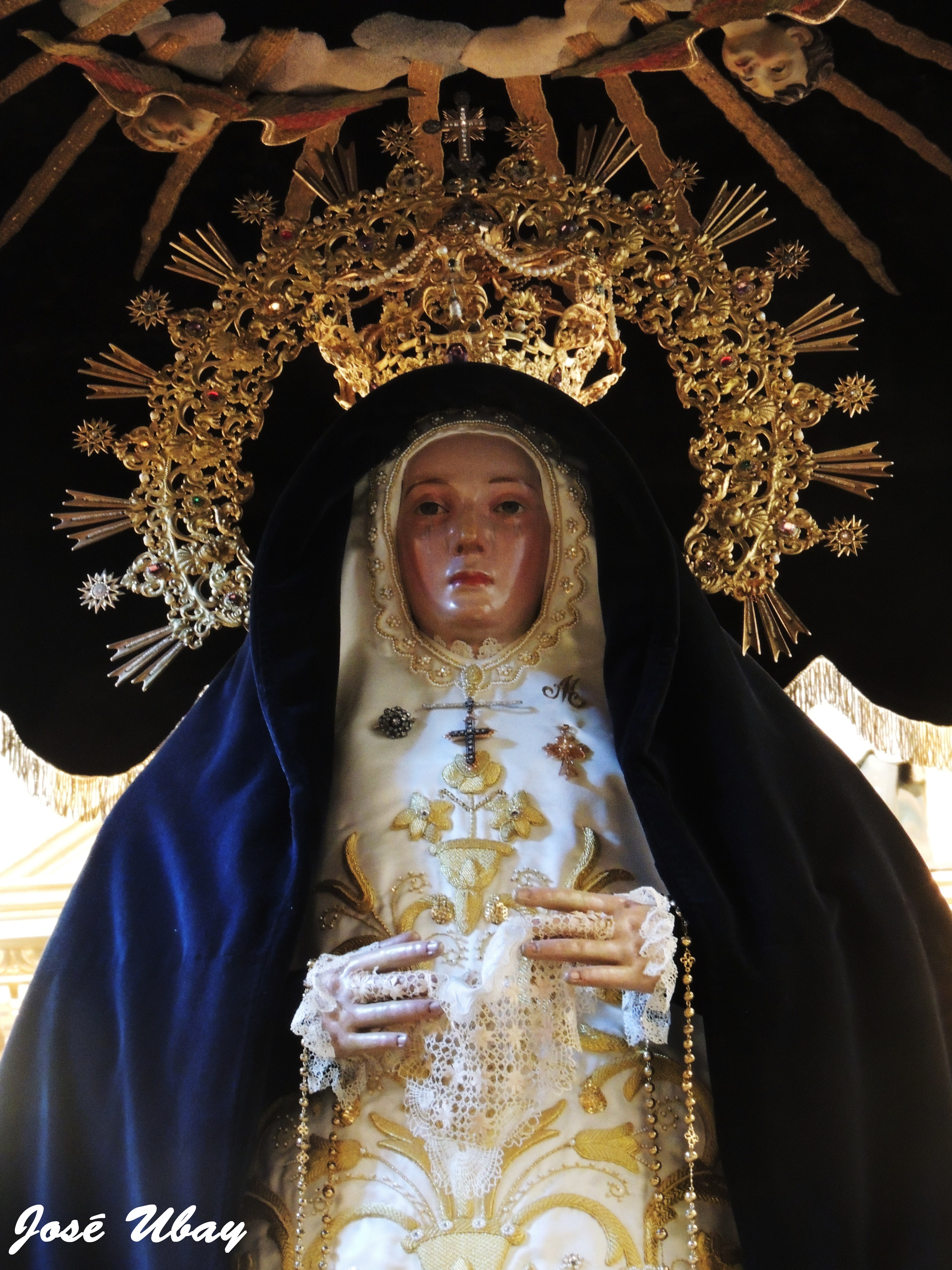 Nuestra Señora de la Soledad de la Portería.Anónimo. Siglo XVI. Parroquia de San Francisco de Asís y Santuario de Nuestra Señora de la Soledad de la Portería. Las Palmas de Gran Canaria.